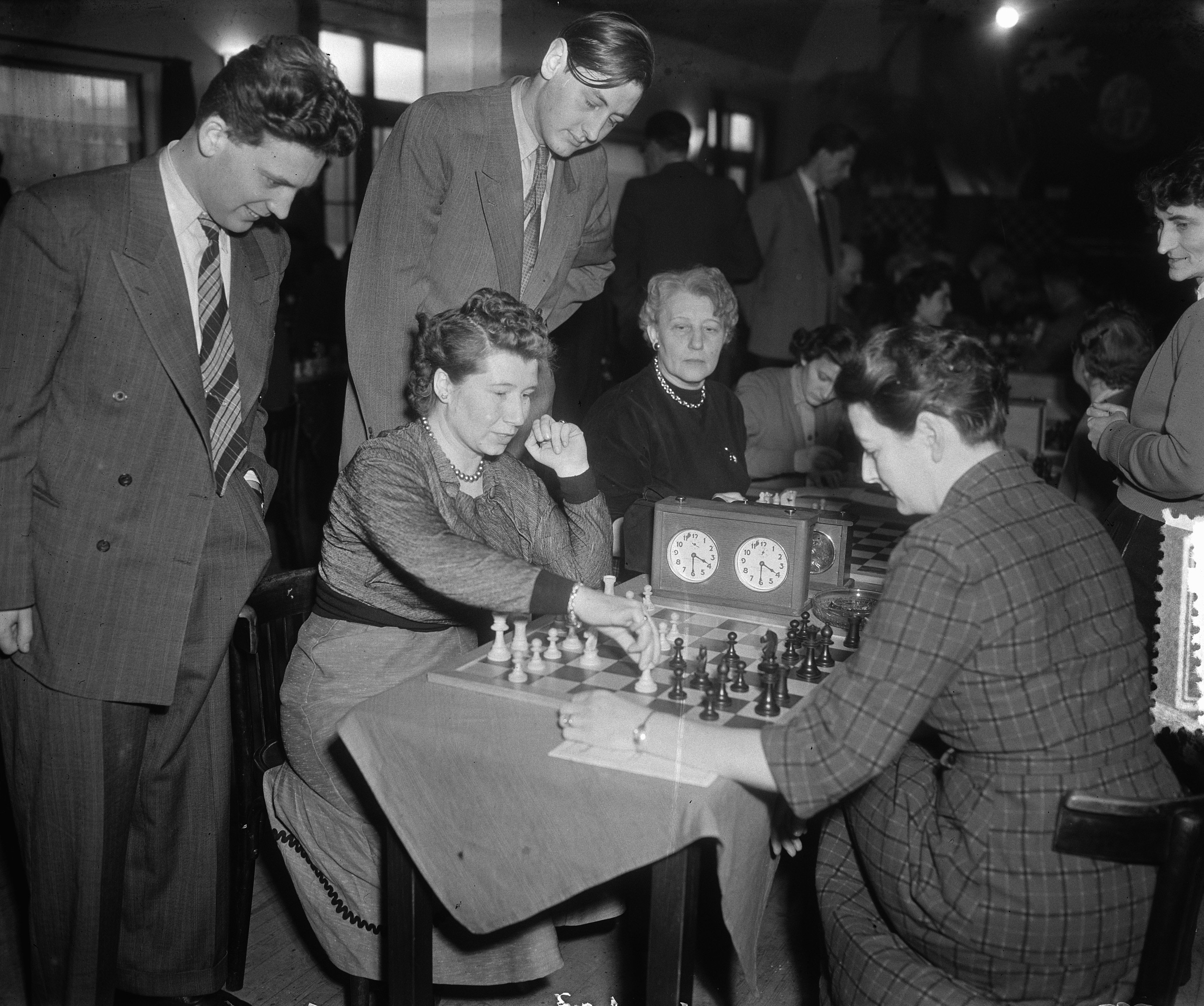 Collectie / Archief : Fotocollectie Anefo Reportage / Serie : [ onbekend ] Beschrijving : Hoogovenschaaktoernooi dames Fenny Heemskerk, Rowena Mary Bruce (née Dew), Donner, Bouwmeester Datum : 12 januari 1953 Persoonsnaam : Bouwmeester, [...], Bruce, R., Donner, [...], Heemskerk, Fenny Instellingsnaam : Hoogovenschaaktournooi Fotograaf : Pot, Harry / Anefo Auteursrechthebbende : Nationaal Archief Materiaalsoort : Glasnegatief Nummer archiefinventaris : bekijk toegang 2.24.01.09 Bestanddeelnummer : 905-4837